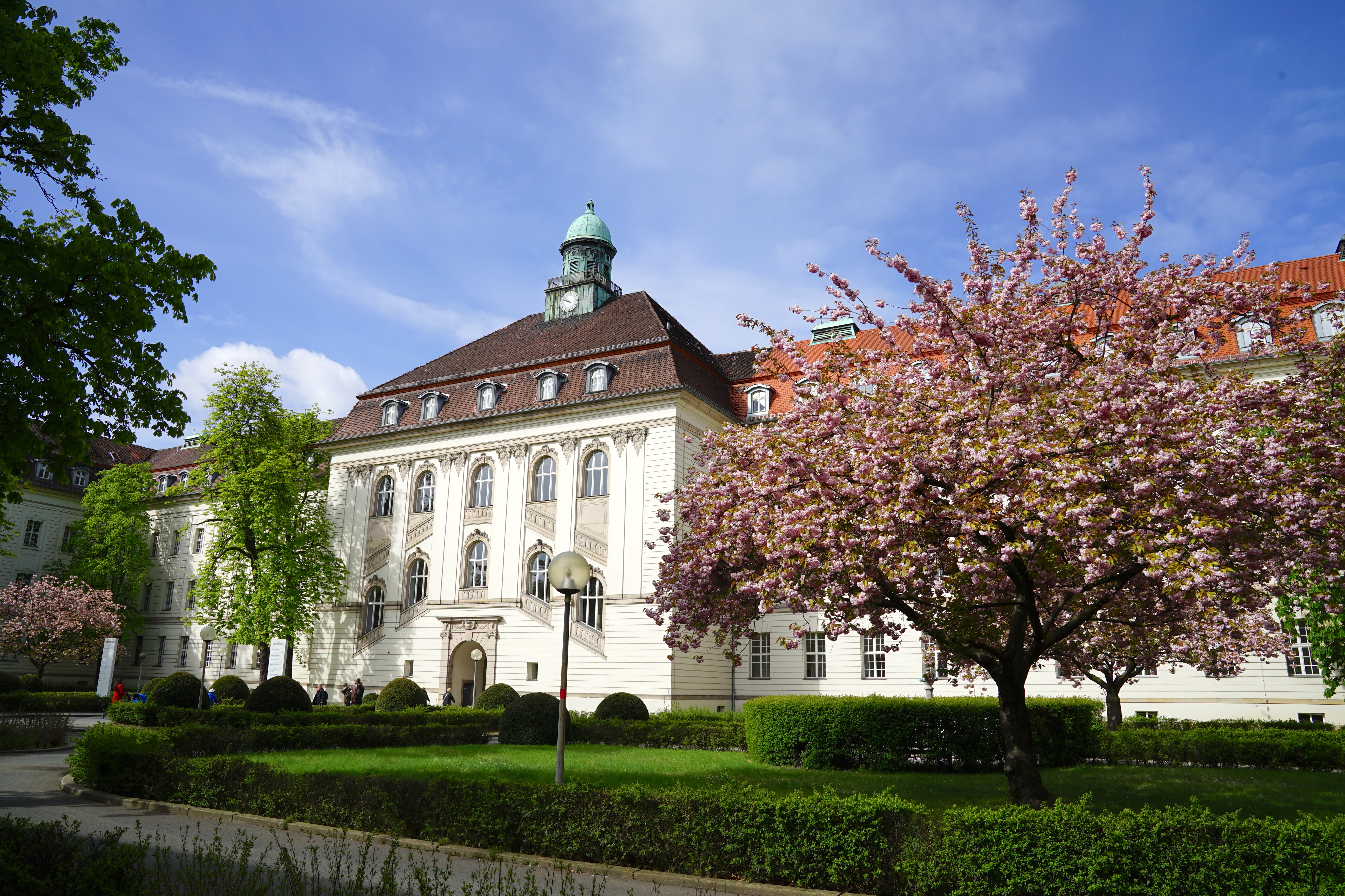 Das Hauptgebäude des DHZB